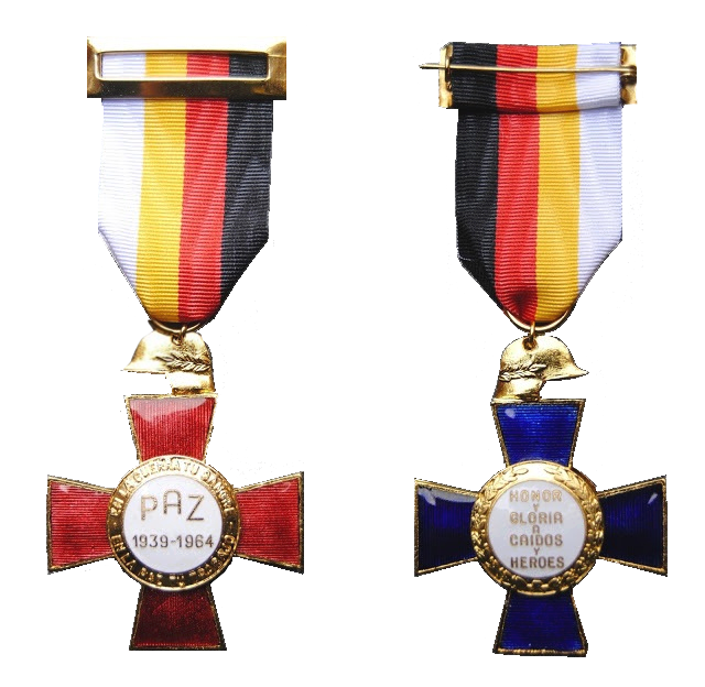 Cruz de los XXV años de Paz o Medalla de la Paz de Franco